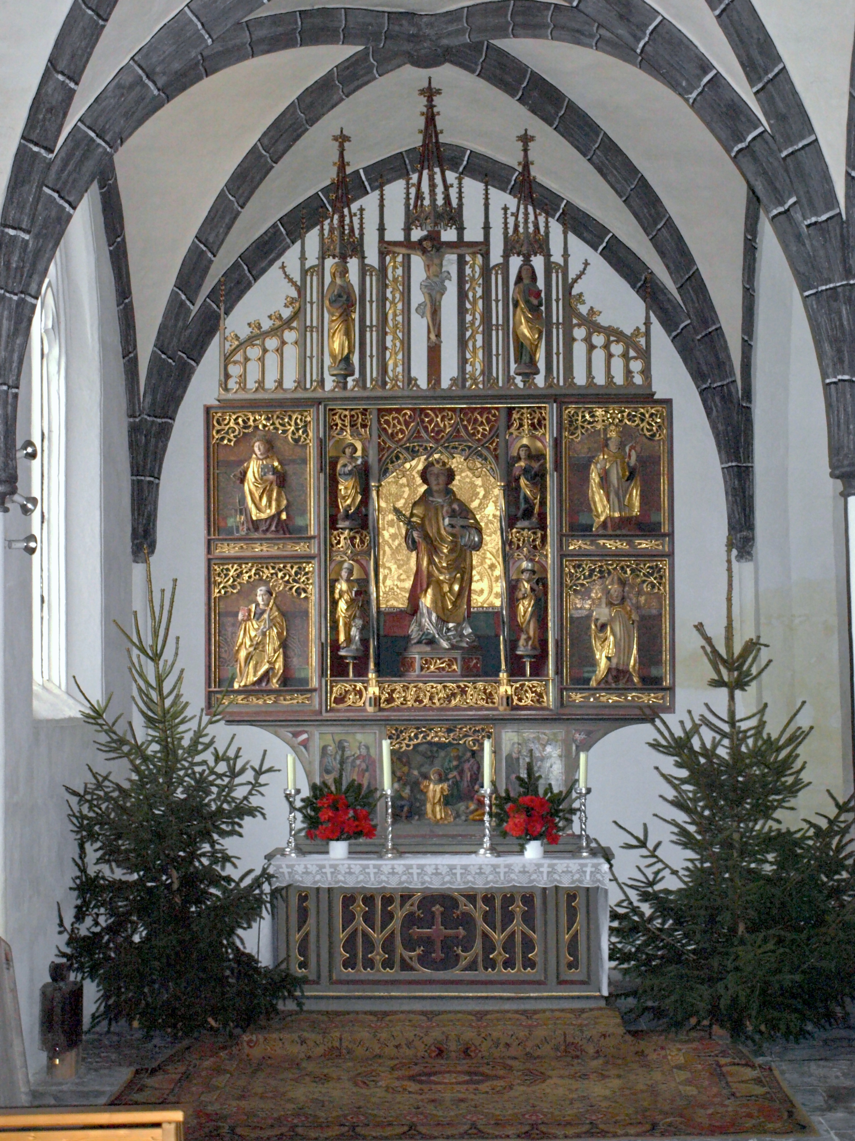 Kath. Pfarrkirche/ Wallfahrtskirche Mariae Himmelfahrt und Friedhof, Krenstetten, Aschbach